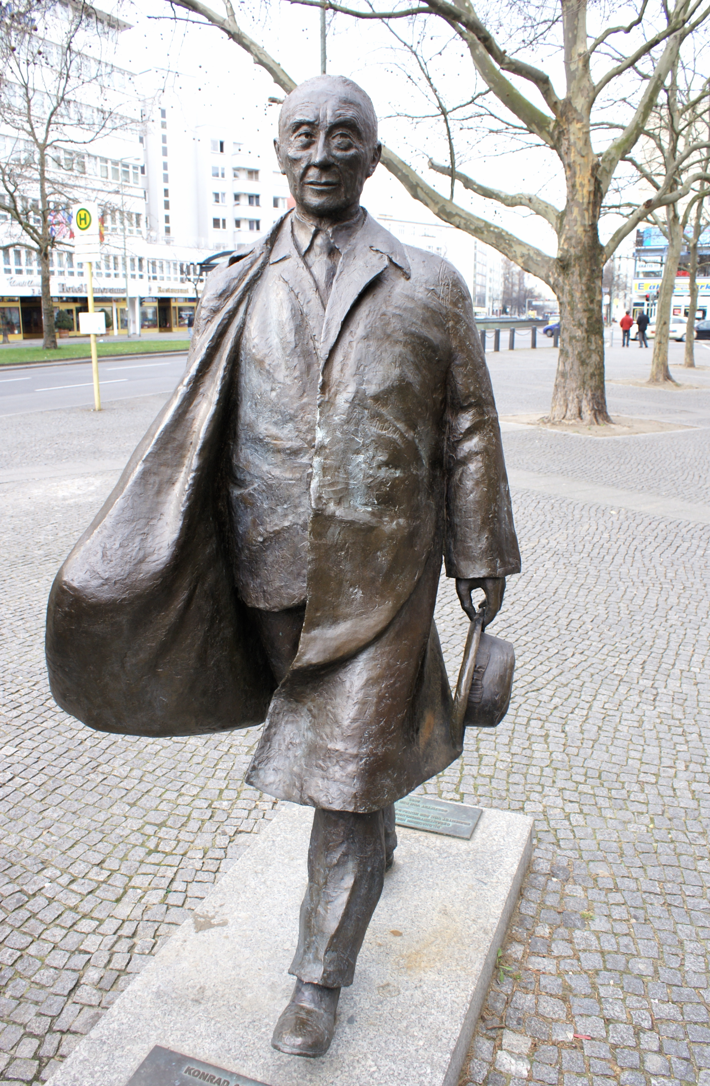 Konrad-Adenauer-Statue am Berliner Adenauerplatz